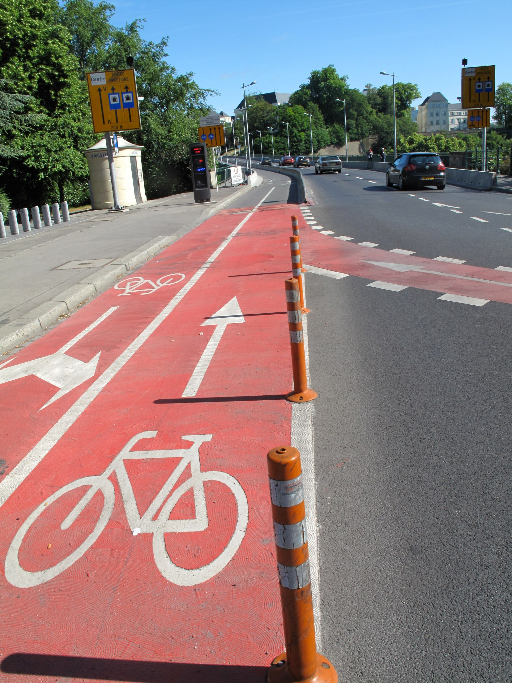 réunion du réseau RUES